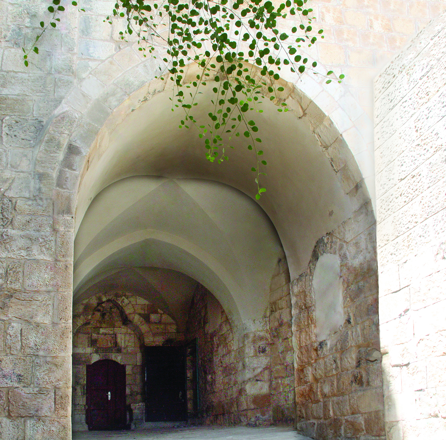 Jerusalem